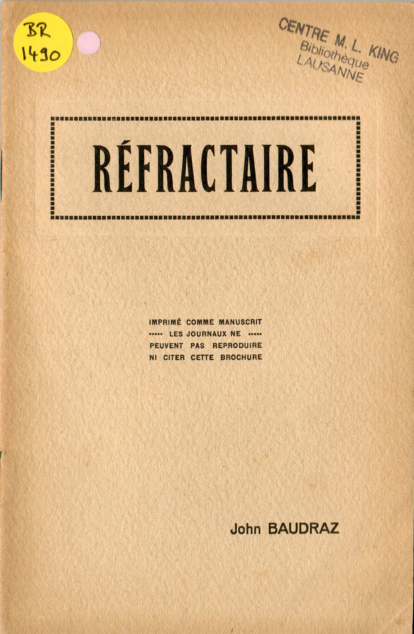 Couverture de la première brochure diffusée par John Baudraz (1890-1968), instituteur vaudois, premier soldat jugé en Suisse pour refus de servir pour motifs religieux durant la Première Guerre mondiale.